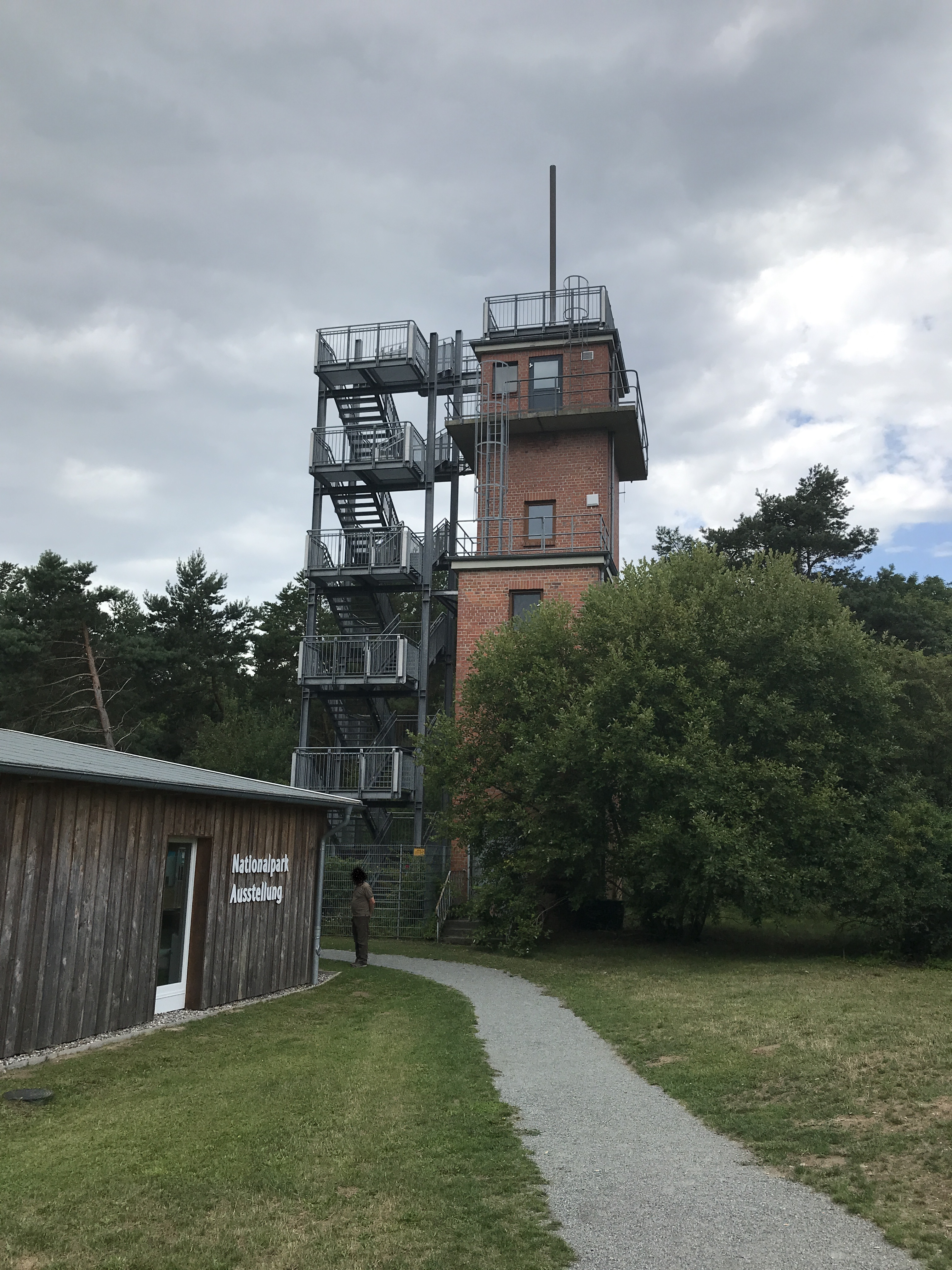 Aussichtsturm Barhöft in Klausdorf bei Stralsund in Mecklenburg-Vorpommern